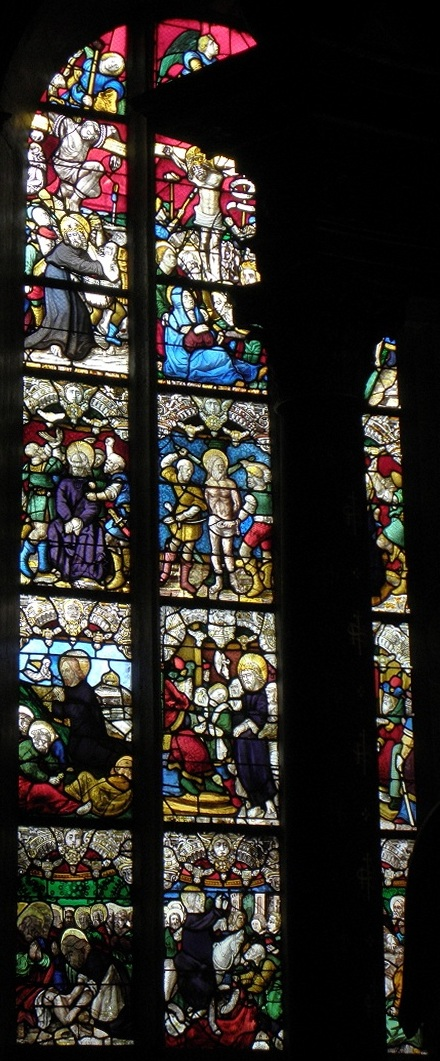 Vitrail de la Passion de l'église Notre-Dame et Saint-Tugen de Brasparts (29). Baie 01. V. 1535.